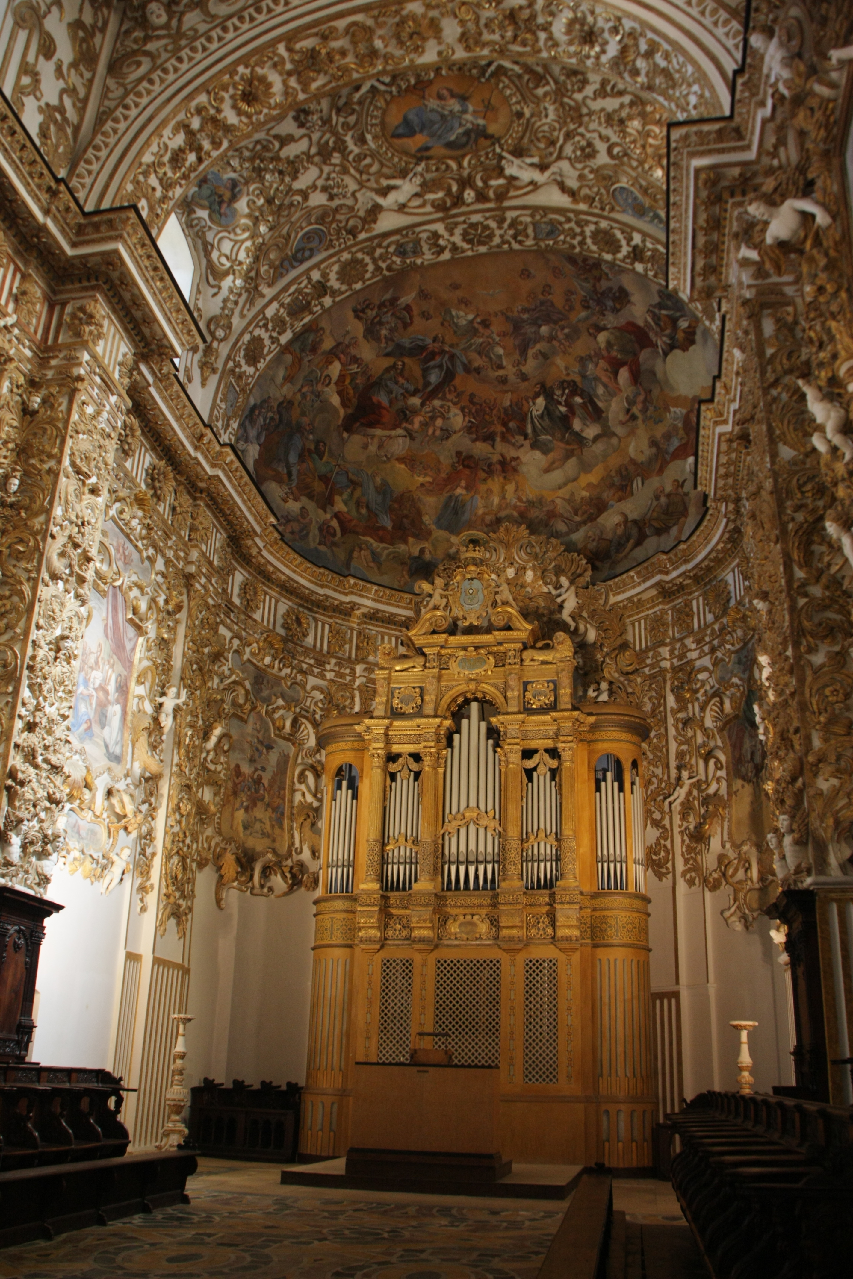 Decorazioni cattedrale Agrigento